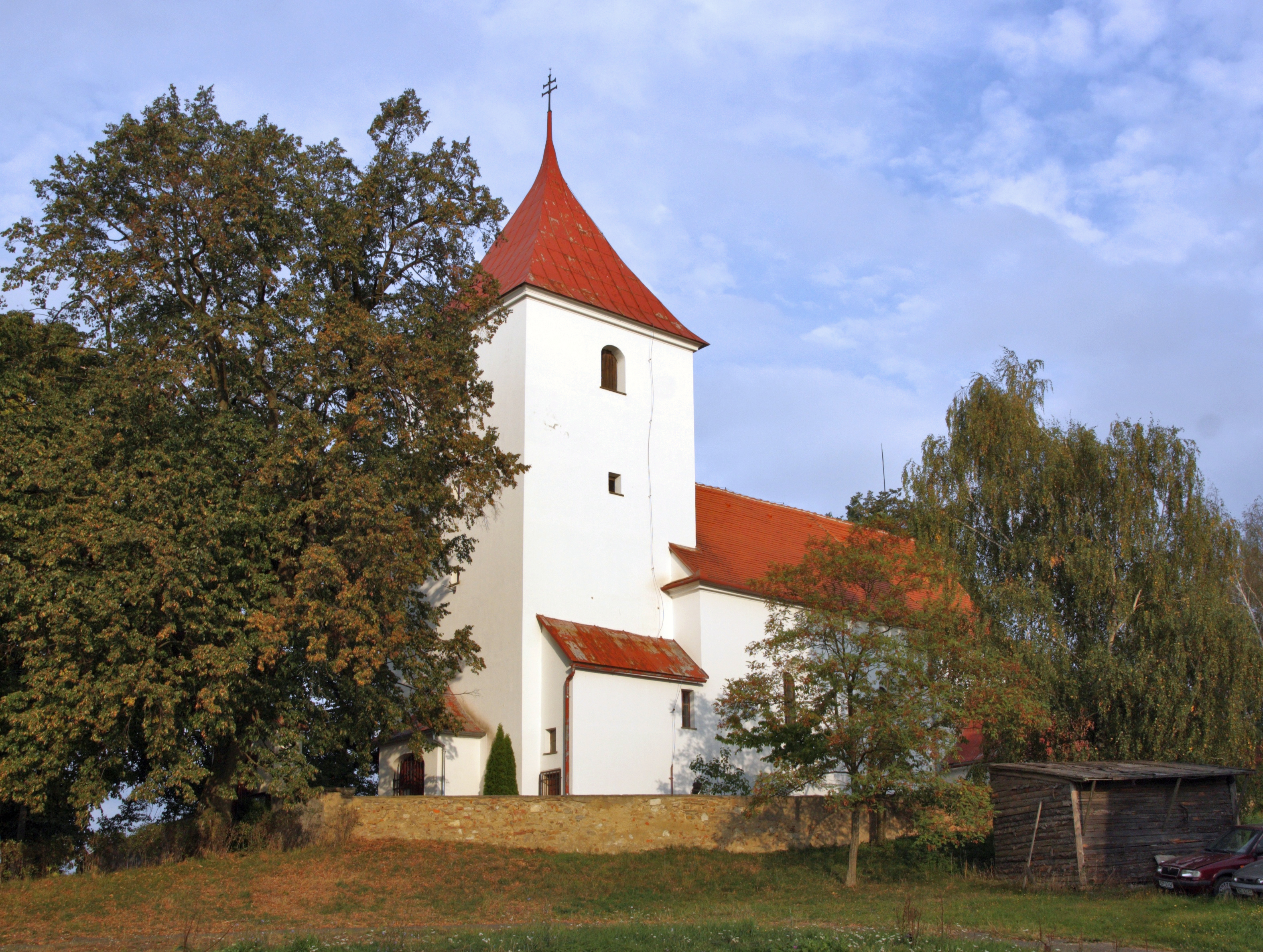 Olší (okres Brno-venkov) - kostel sv. Jiří od západu.